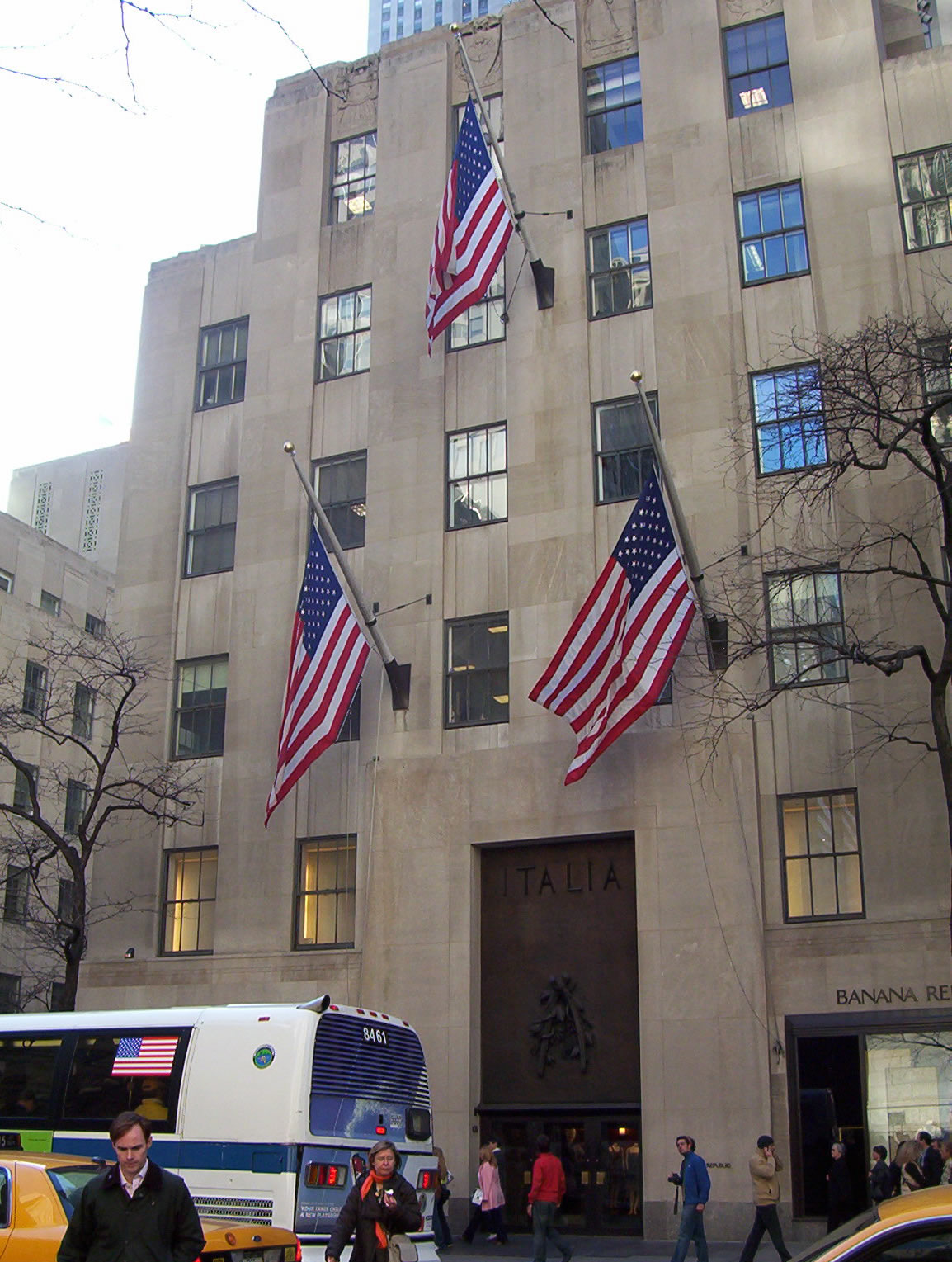 Entrée du Palazzo d'Italia sur la 5e Avenue, Rockefeller center - NYC